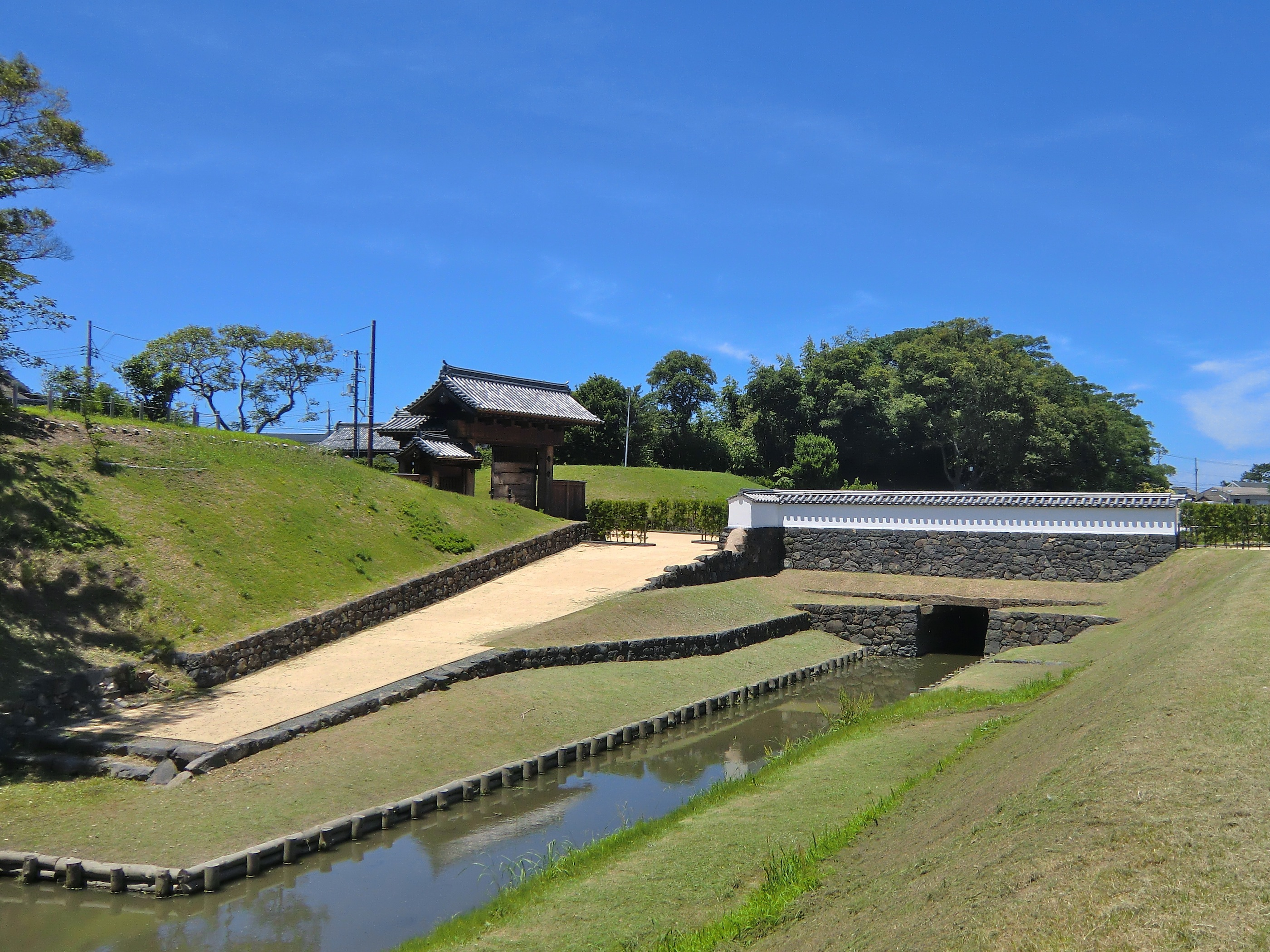 萩城北の総門（山口県萩市）